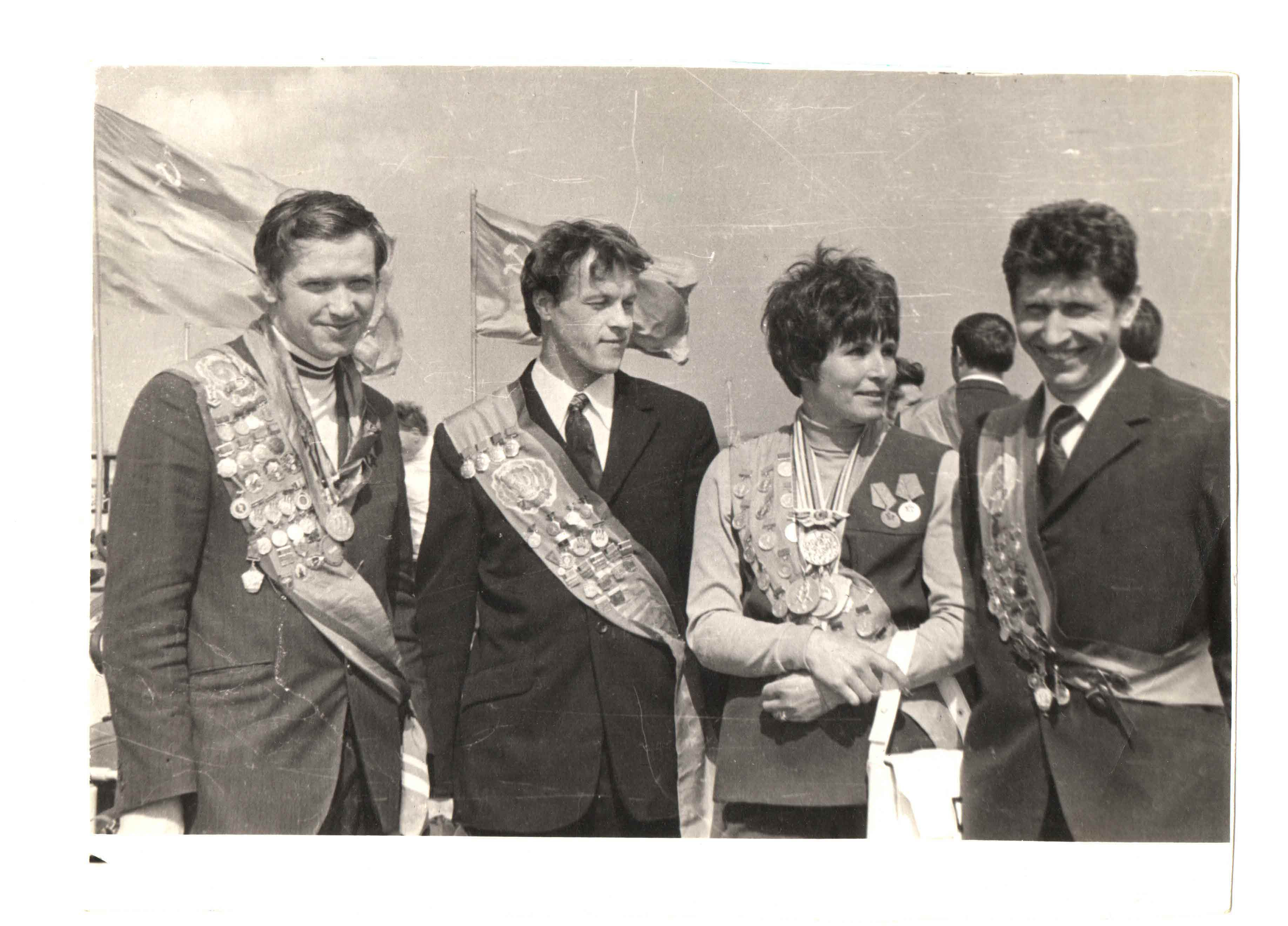 Ветераны легкой атлетики г.Горького на первомайской демонстрации.